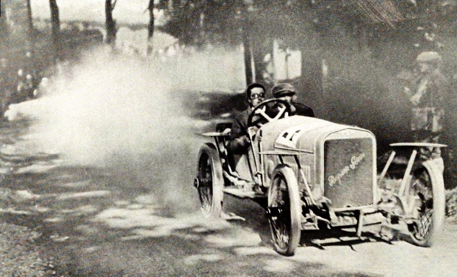 Bara sur Hispano-Suiza en 1914 (La Vie au Grand Air, 1er août 1914, p.694). Il remporte du 20 au 22 juillet cette année-là à Boulogne-sur-Mer la Coupe Franchomme, le Prix de l'Automobile-Club du Nord, et la Coupe de Caraman-Chimay (en épreuves de tourisme).